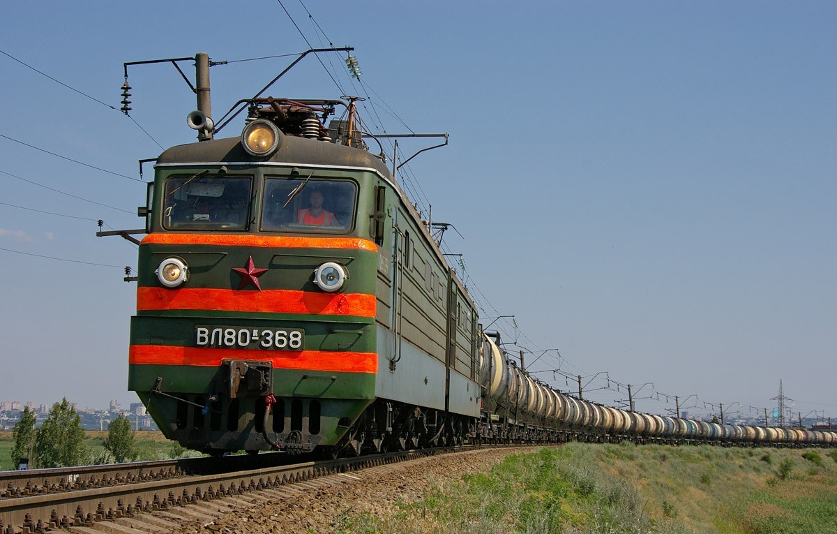 Электровоз ВЛ80К-368 с поездом около Батайска